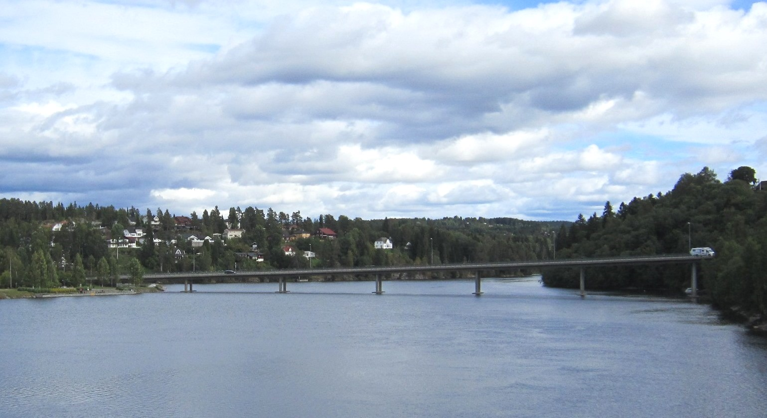 Fylkesvei 181 krysser Vorma på Eidsvollbrua.